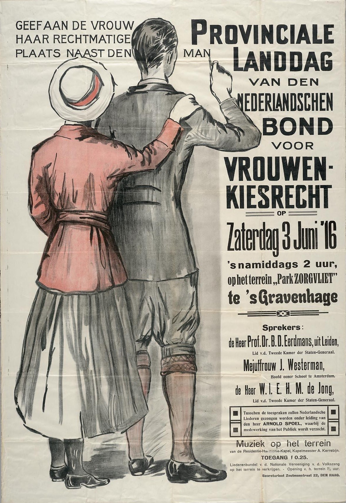 Affiche: De Nederlandsche Bond voor Vrouwenkiesrecht werd in 1907 opgericht als afsplitsing van de Vereeniging voor Vrouwenkiesrecht, onder anderen door Elisabeth van Dorp en Welmoet Wijnaendts Francken-Dyserinck. De Bond organiseert op zaterdag 3 juni 1916 een provinciale landdag in park Zorgvliet te Den Haag. Sprekers waren B.D. Eerdmans, theoloog en namens de Liberale Unie lid van de Tweede Kamer, evenals W. de Jong. Johanna Westerman was hoofd van een meisjesschool in Amsterdam.